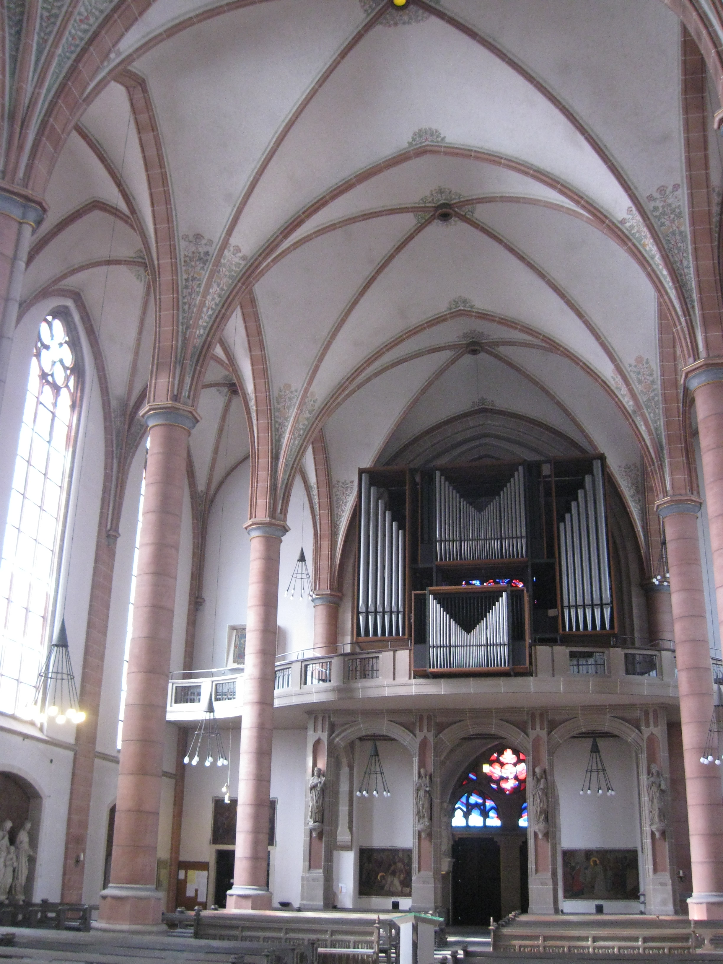 Die Orgel der Propsteikirche St. Urbanus (Gelsenkirchen-Buer)